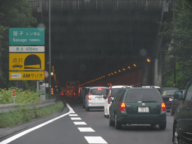 2009年5月5日、中央道上り笹子トンネル入口付近で撮影